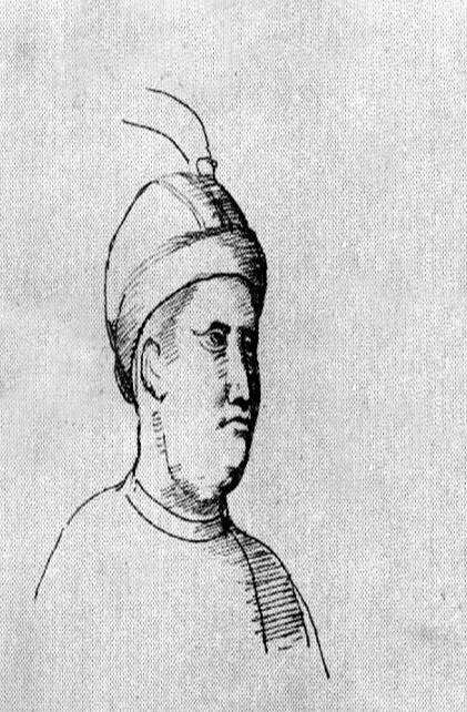 კოლხეთის დედოფლის მამა პაპუნა ჭილაძე